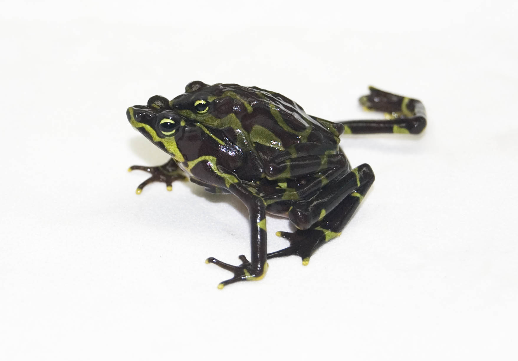 Atelopus limosus